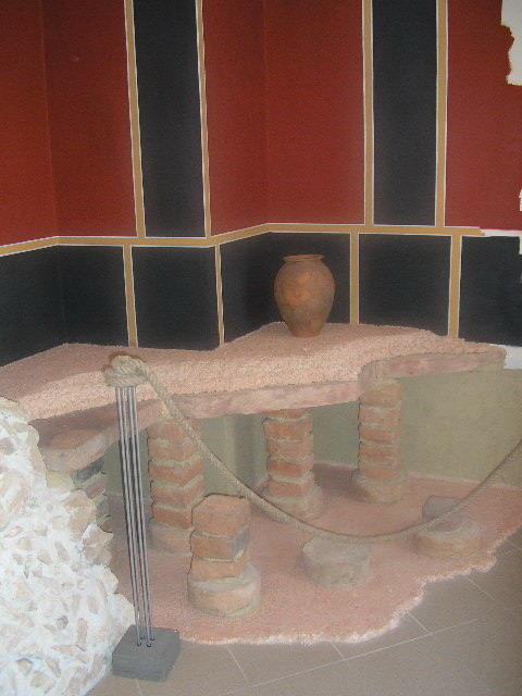 Római villa padlófűtésének rekonstruált változata a komáromi múzeumban